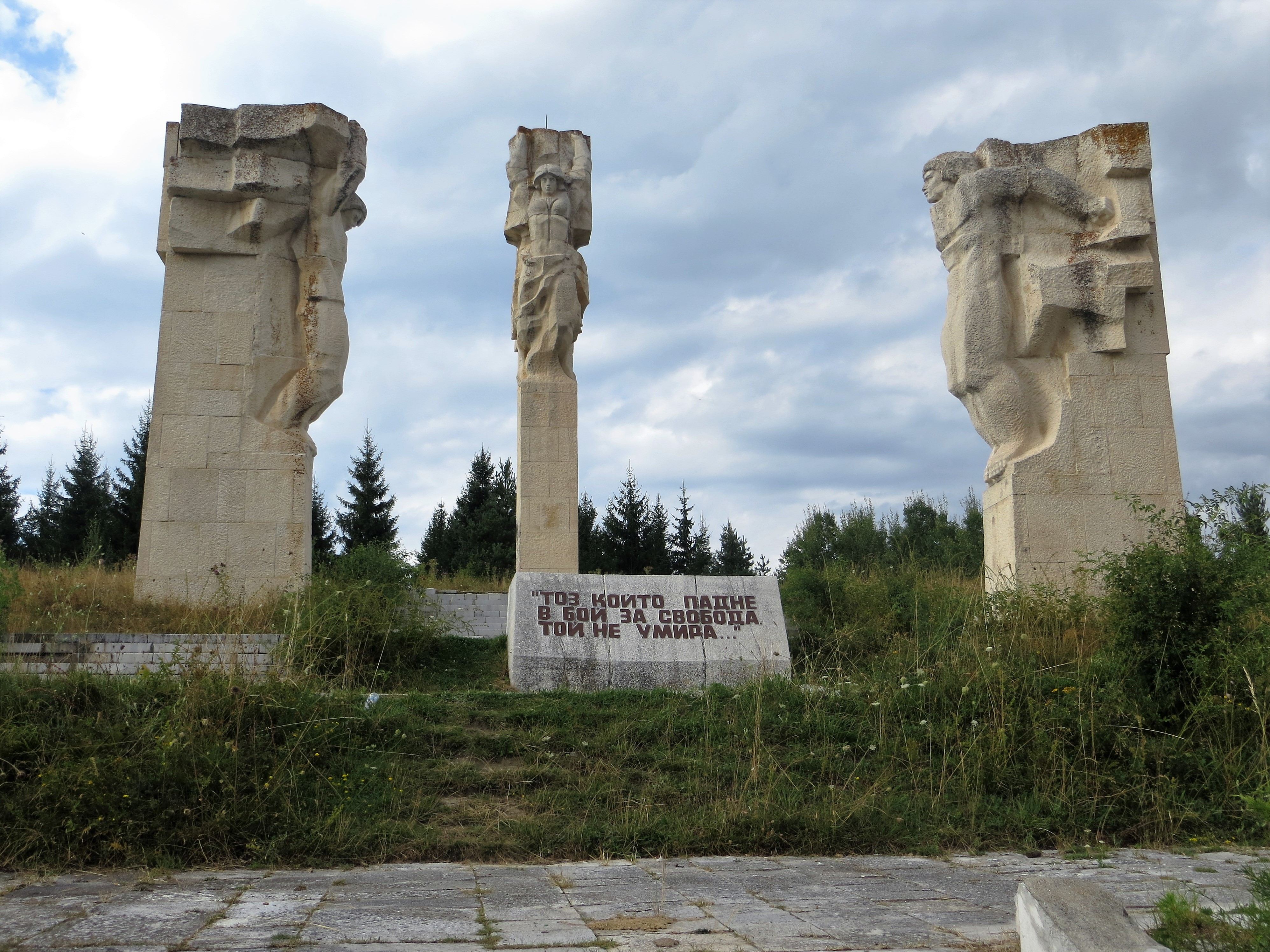 Историческа църква-костница "Света Неделя"